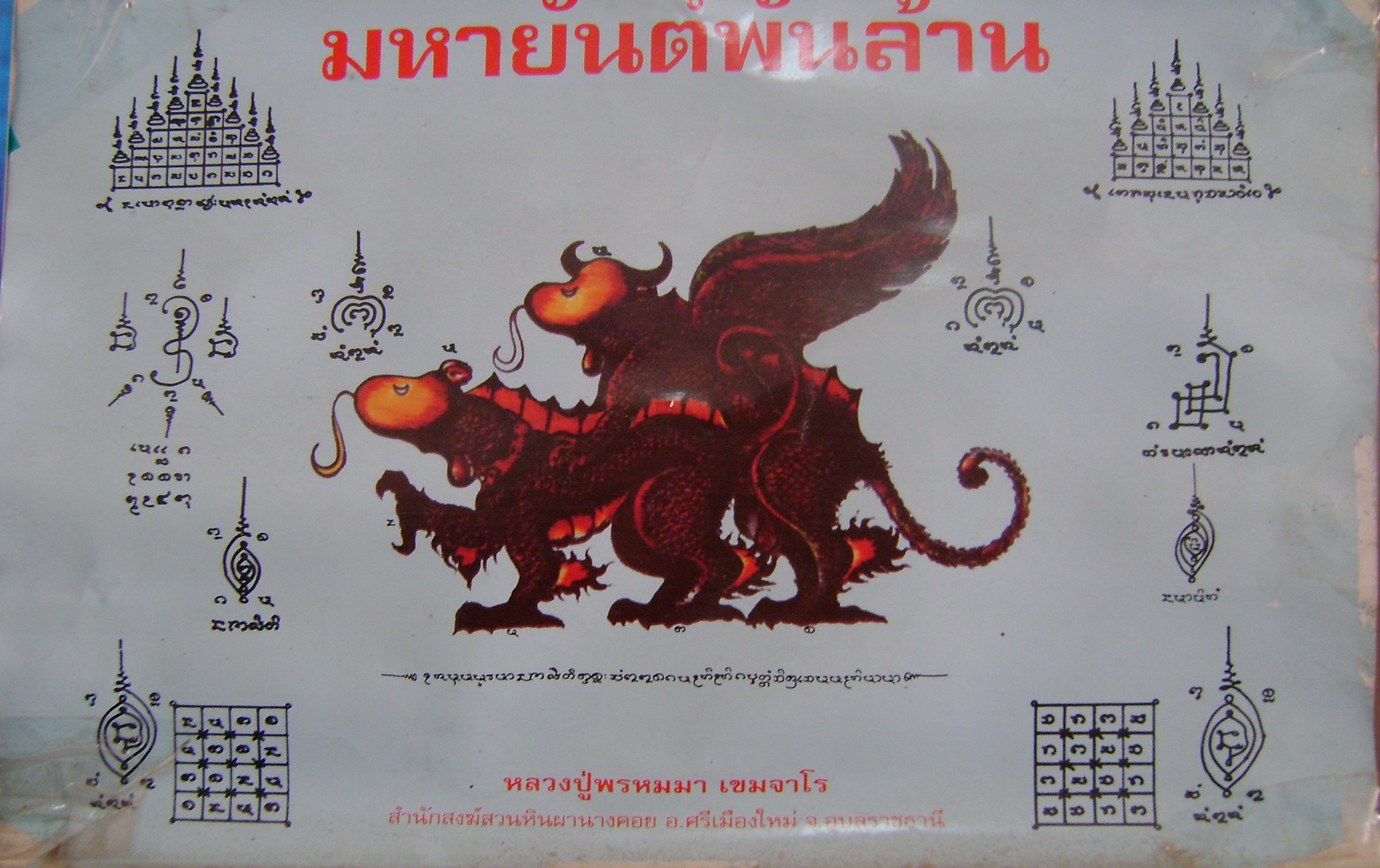 Photo of มหายันต์พันล้าน Yantric diagrams